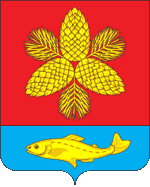 Герб Шкотовского района Приморского края